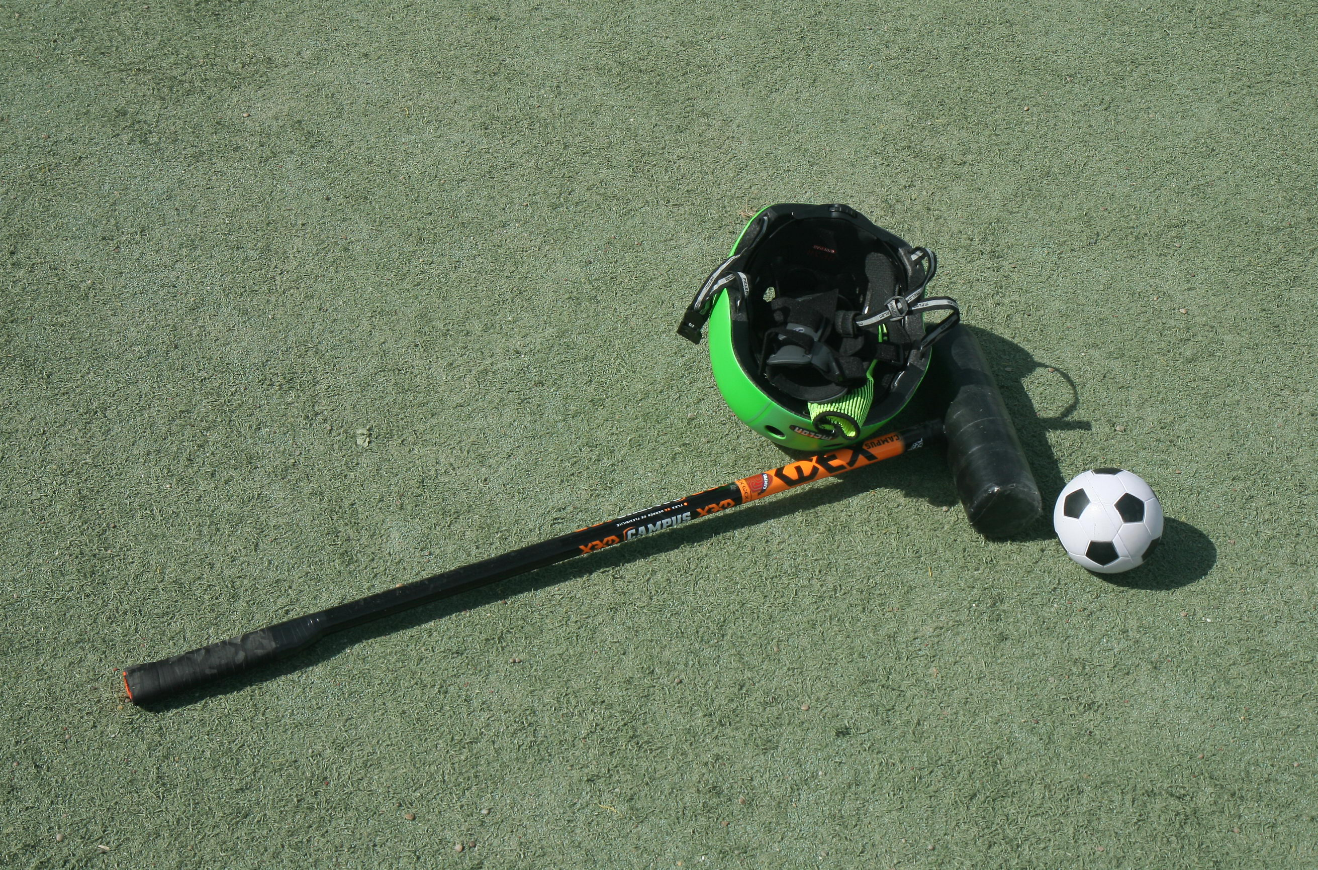 Segwaypolo-Weltmeisterschaft 2017 in Hemer: Mallet (Schläger) mit einem 285 Gramm schweren Kopf aus geschlossenzelligem Schaumstoff, Helm mit Kinngurt und Ball aus einem komprimierbaren Schaumstoffmaterial mit einem Durchmesser von 10 cm bis 11 cm.